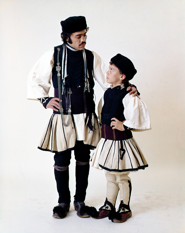 Ανδρική και παιδική φορεσιά της "Πολίτικης" σαρακατσάνικης φορεσιάς. Συλλογή Πελοποννησιακού Λαογραφικού Ιδρύματος, Ναύπλιο